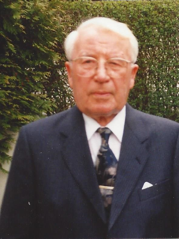 Fotografie von Gustav Kuhr (1914-2000)